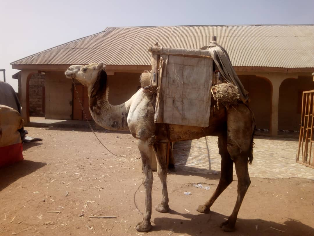 UN DROMADAIRE DANS LA COUR A SEGBANA DU COTE DE LA FRONTIERE BENIN-NIGERIA